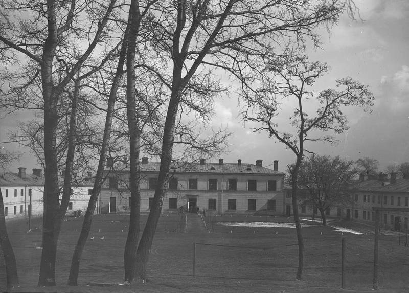 Budynek "Szkoły Gazowej" przy ul. Gdańskiej 6 w Warszawie